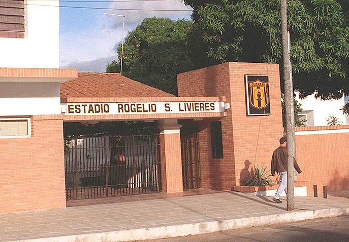 gurani